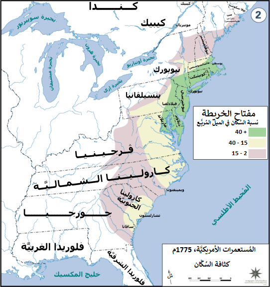 كثافة السُكَّان في المُستعمرات الأمريكيَّة الثلاثة عشر سنة 1775م.